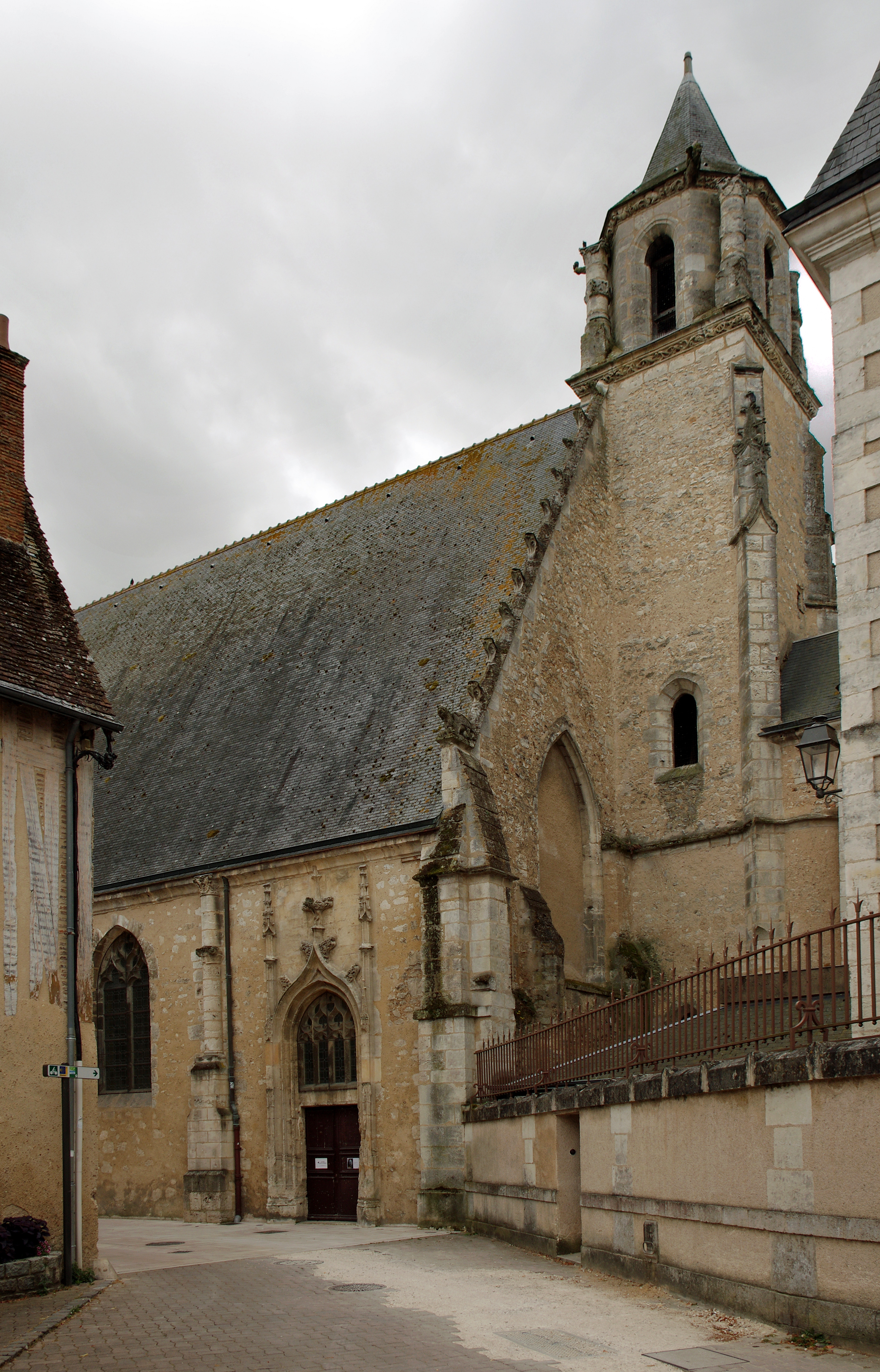 Vendôme (Loir-et-Cher) La rue Saint-Jacques et la chapelle Saint-Jacques. Dès le XIIe siècle, la chapelle de l'hôpital de Saint-Jacques accueille des pèlerins car elle était une étape sur le chemin de Saint-Jacques de Compostelle. L'aspect actuel de style gothique flamboyant de la chapelle résulte des importants travaux de transformation des XVe siècle et XVIe siècle. En 1623, les pères de l'Oratoire, en font la chapelle du collège situé à proximité. Elle deviendra magasin militaire à la Révolution française, puis salle de spectacle. En 1826, le collège des Oratoriens retrouve sa chapelle qui est rendue au culte. Depuis 1982, la chapelle Saint-Jacques est devenue un établissement de la vie culturelle vendômoise, elle accueille des expositions et des concerts.